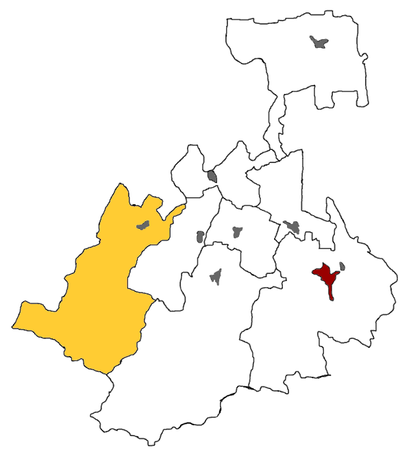 Ирон: Æрæфы район